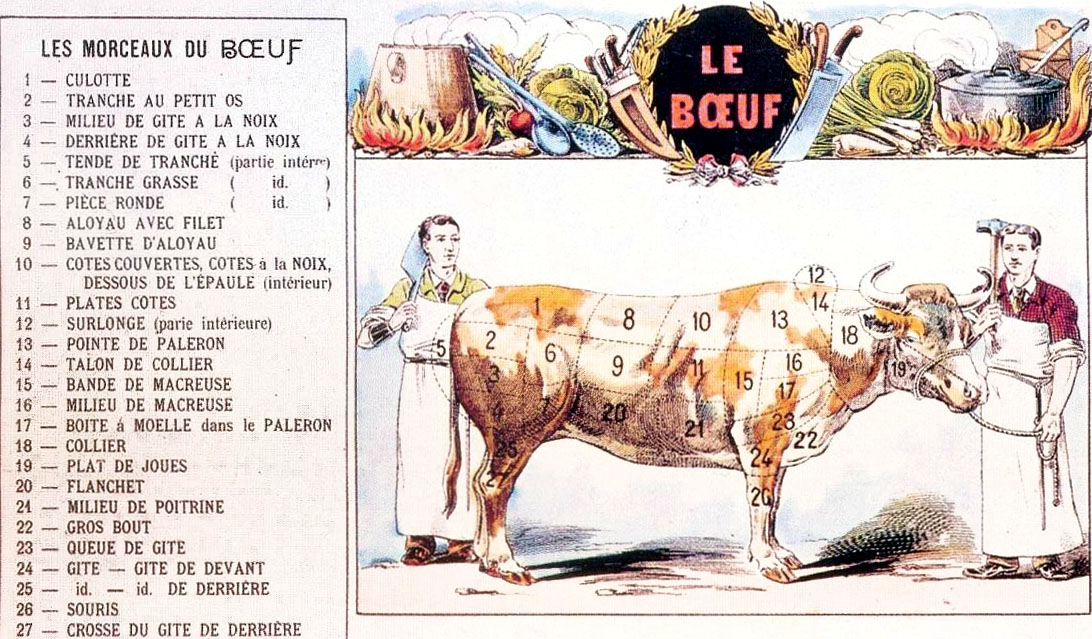 Découpe du boeuf, image d'Epinal